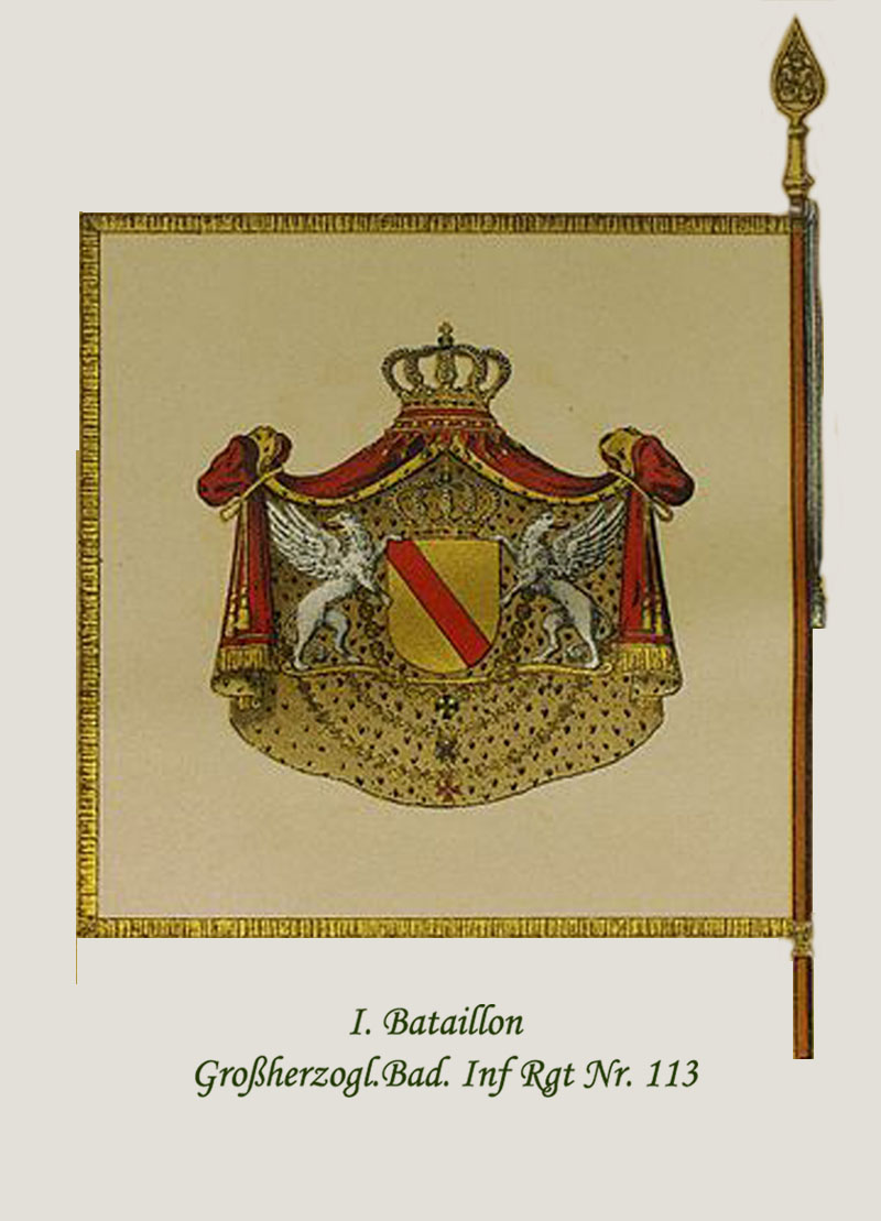 Rückseite der Fahne des I. Bataillons des 5. Badischen Infanterie-Regiments Nr. 113